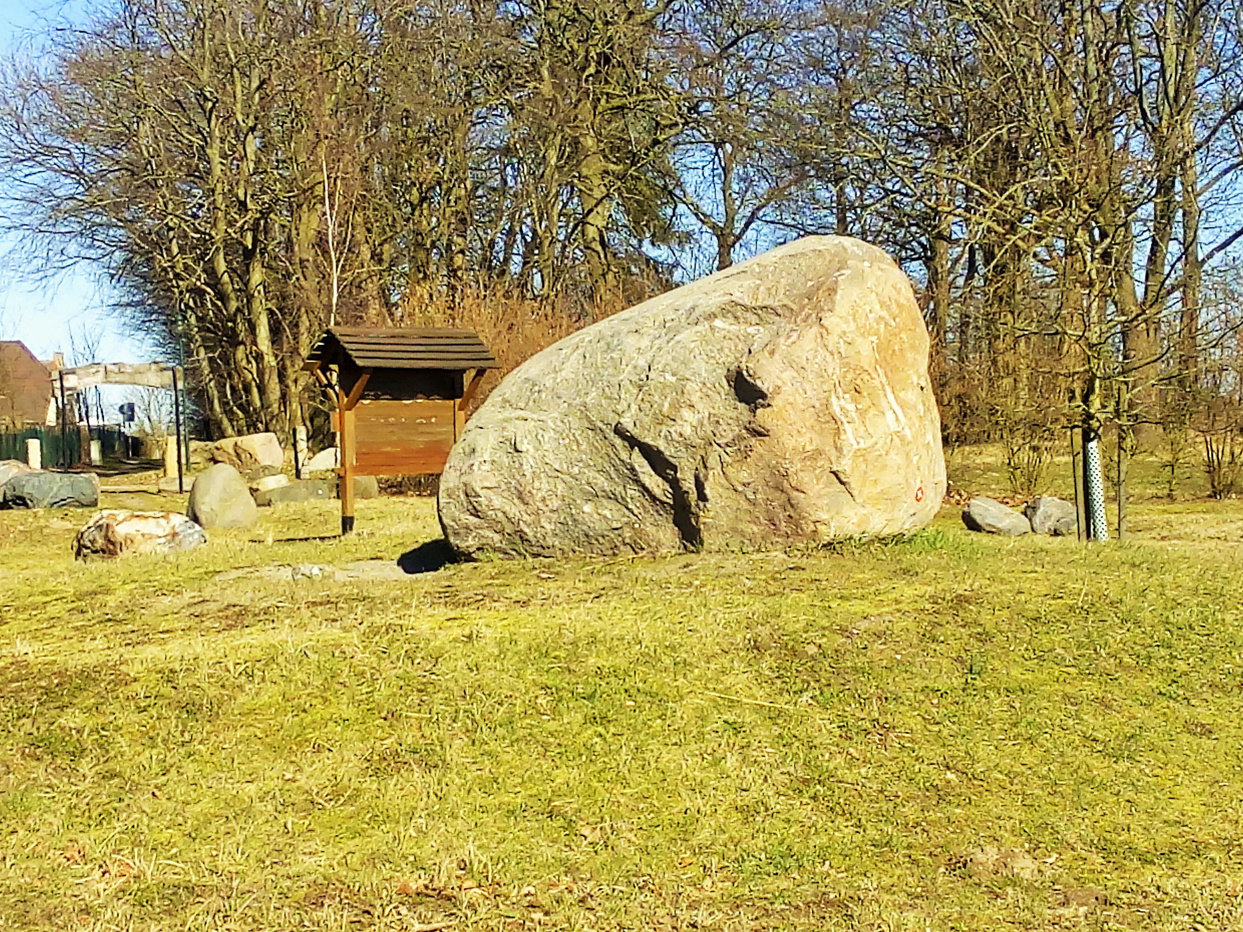 Blick von Findlingsgarten Richtung Gutspark